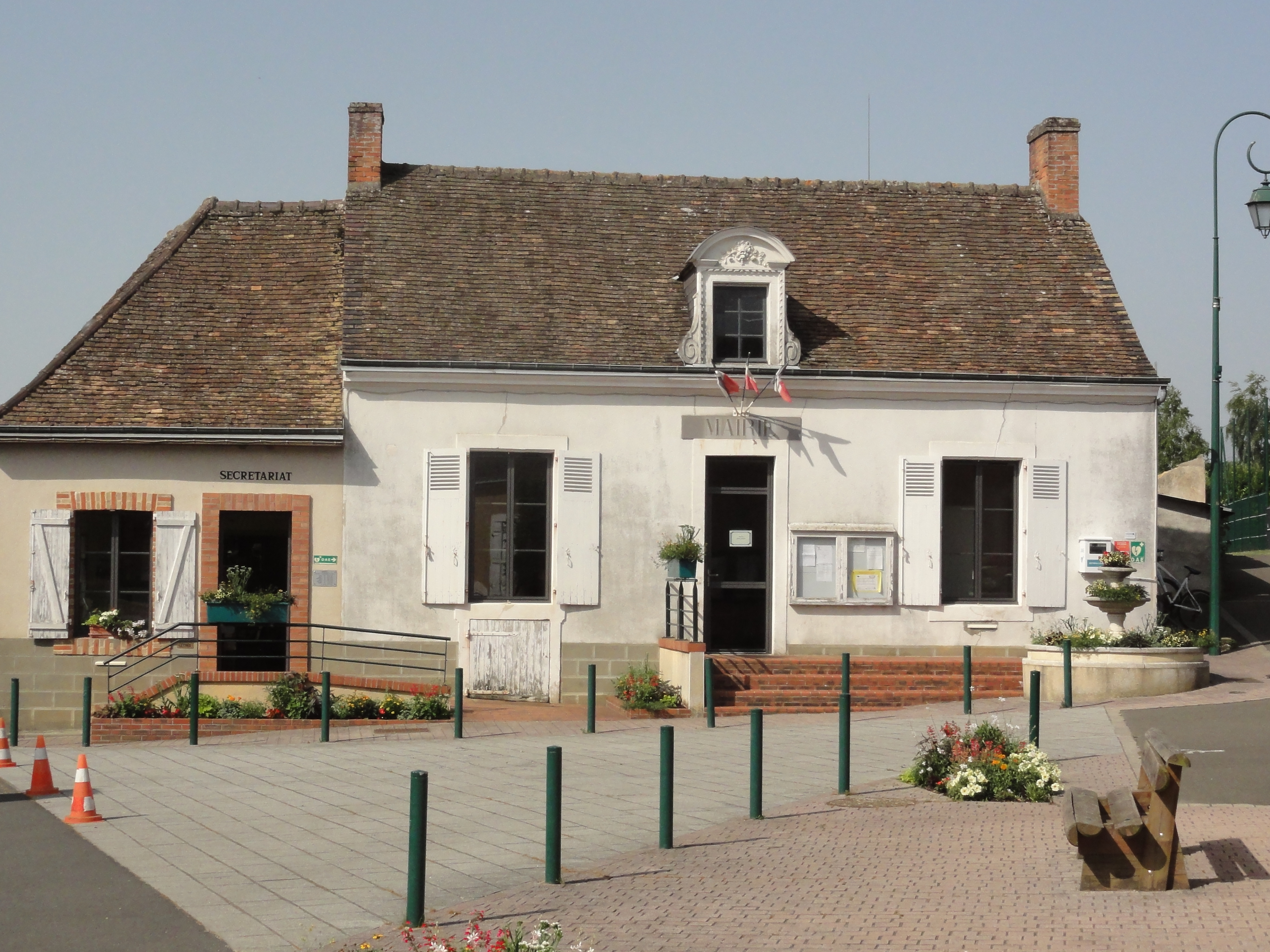 Souligné-sous-Ballon (Sarthe) mairie